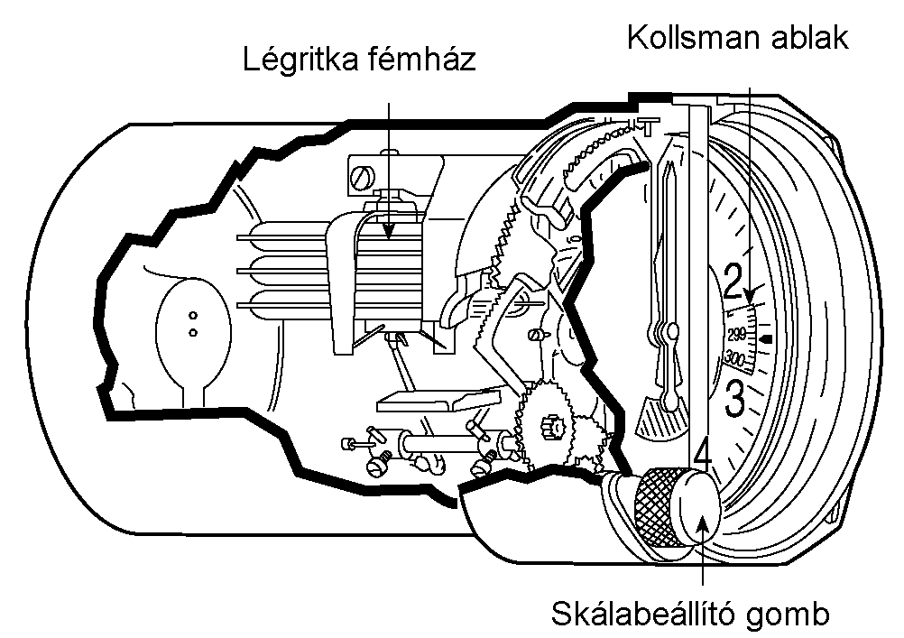 Nyomásmagasságot mérő műszer repülőgépen